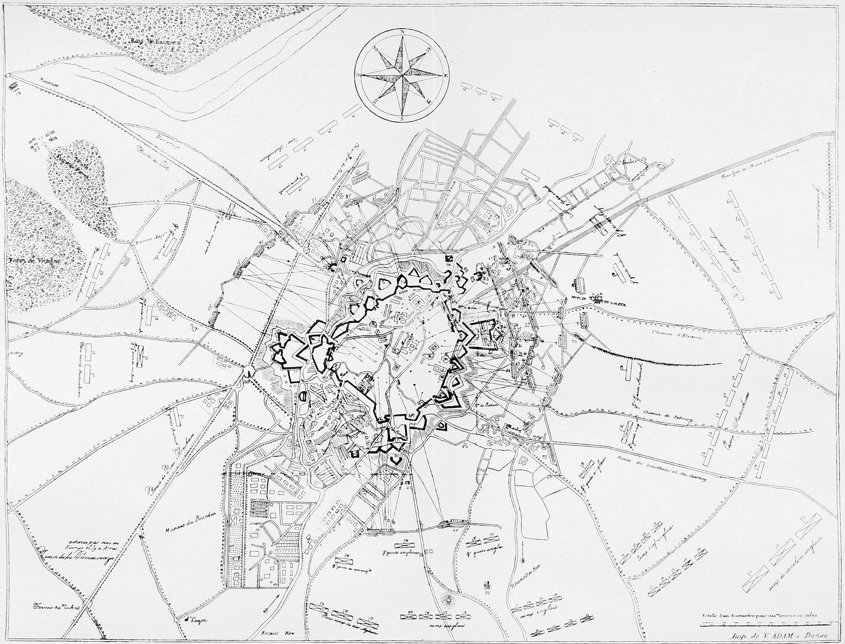 План осады Валансьена в 1793 году. Данное изображение было использовано в статье «Валансьенн» опубликованной в пятом томе «Военной энциклопедии», который был издан книгоиздательским товариществом Ивана Дмитриевича Сытина в 1911 году в столице Российской империи городе Санкт-Петербурге.